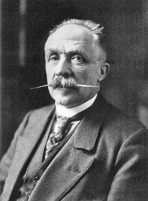 M. Lefebvre du Prey, député de Saint-Omer, ministre de l'Agriculture : photographie de presse